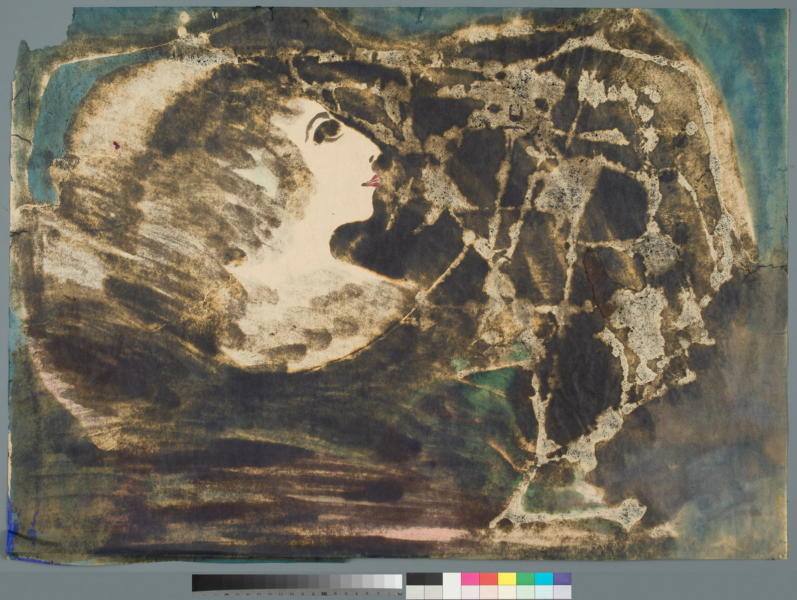 Abstrakte Arbeit von Hans Geistreiter 1968